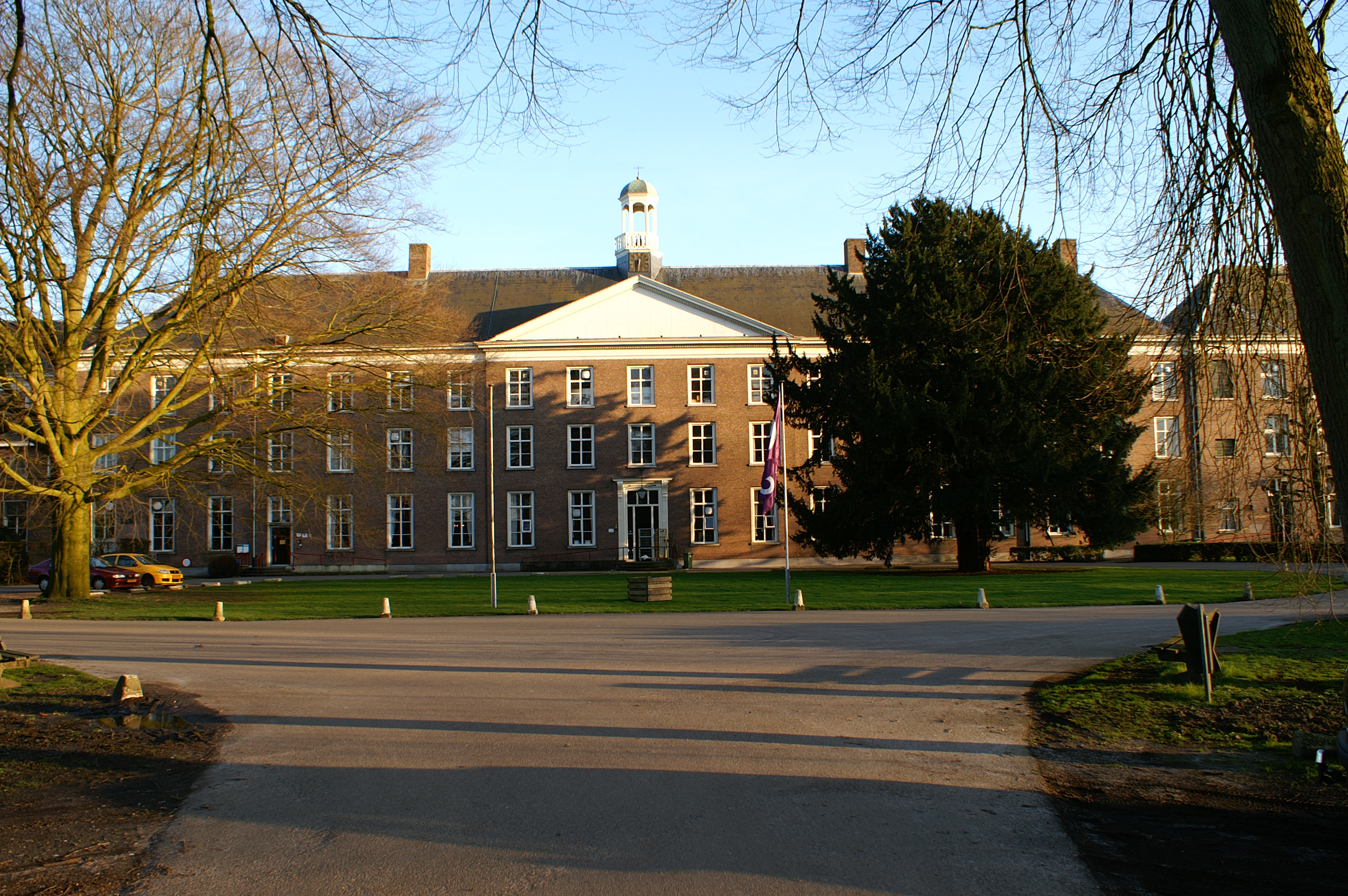 Huize Haarendael te Haaren.